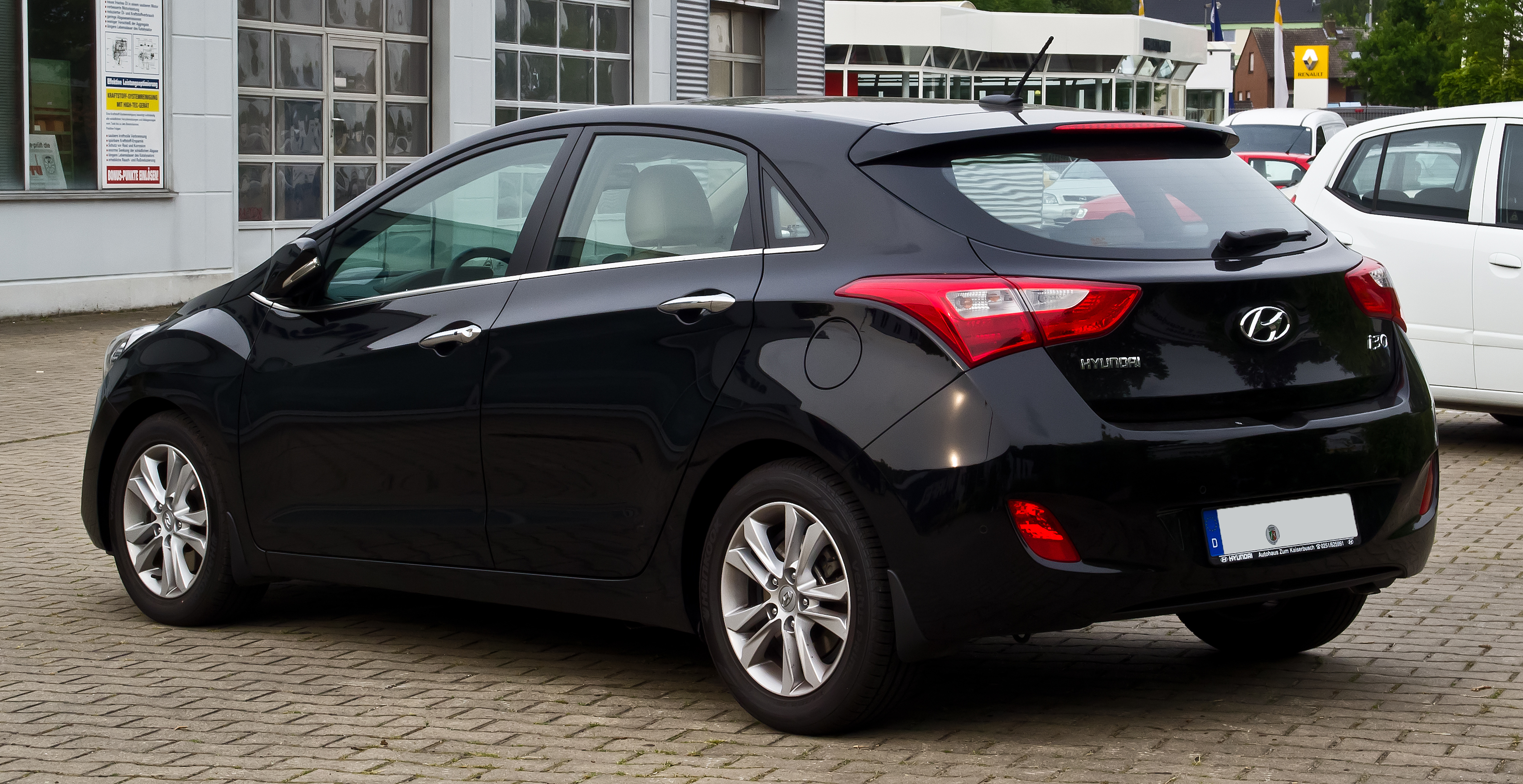 Hyundai i30 1.6 CRDi Style (II)